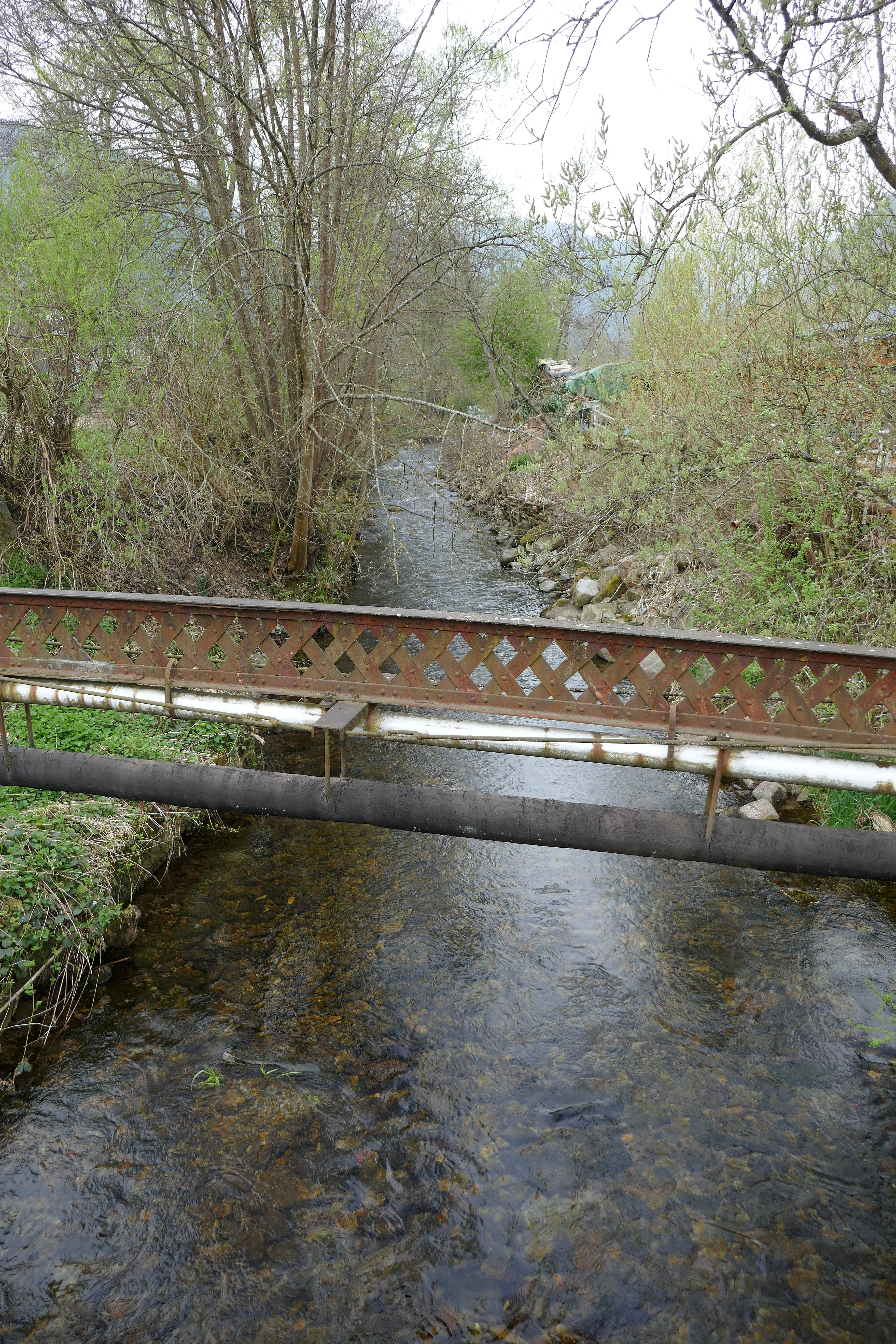 La Wormsa (petit affluent de la Fecht) à Metzeral (Haut-Rhin) au lieu dit Steinabrück (497 m).